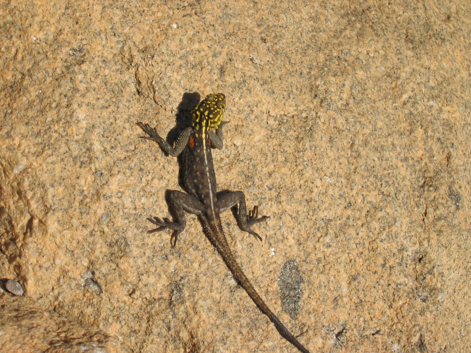 Agama planiceps en: Namibian rock agama, Windhoek, Namibia de: Plattkopfagame, Windhuk, Namibia